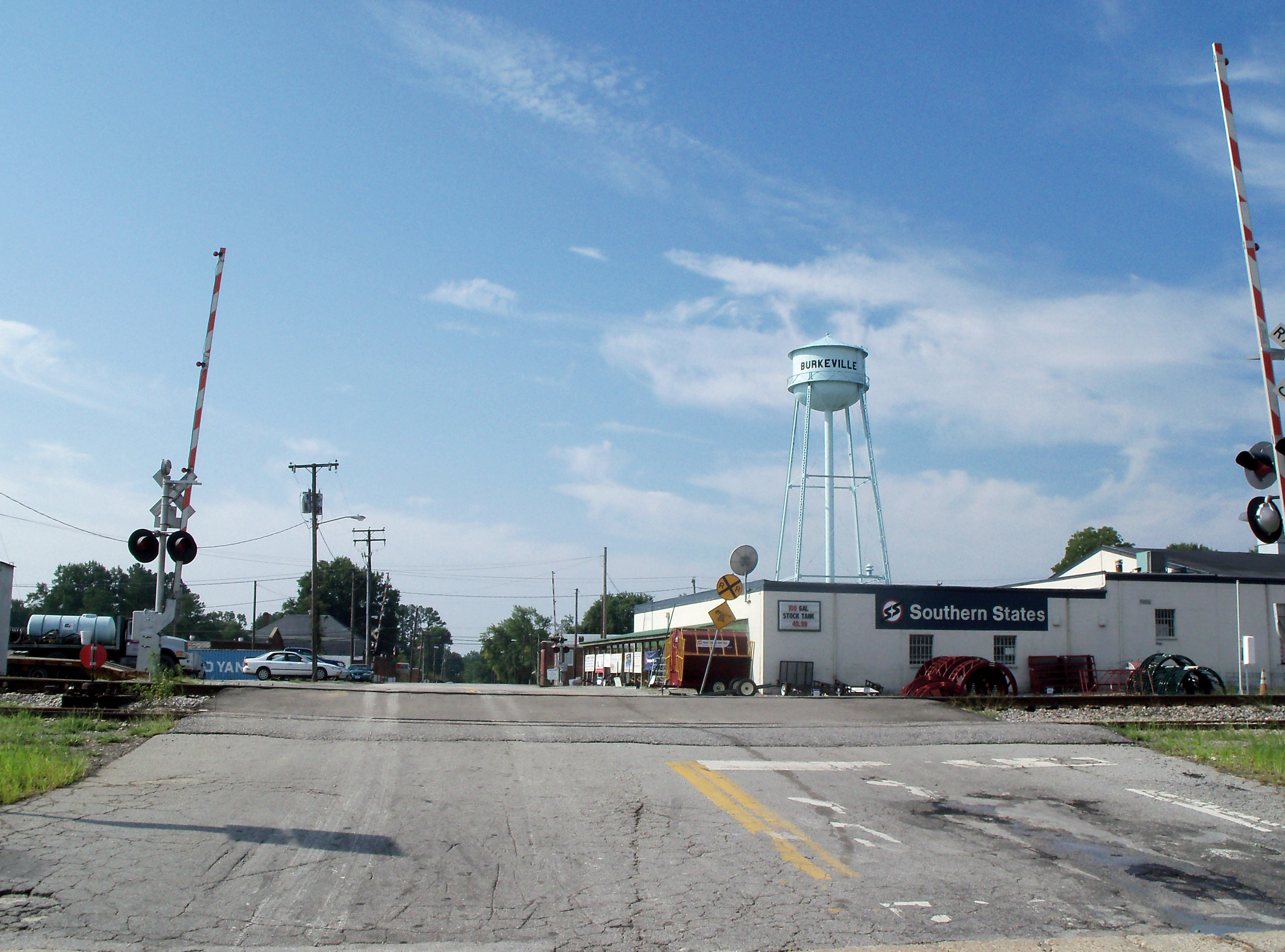 Burkeville, Virginia